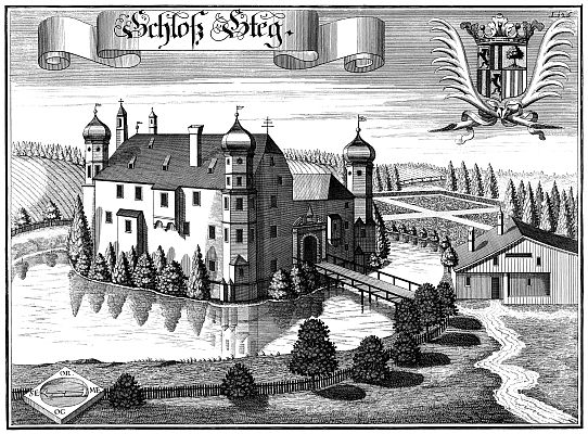 Ansicht Schloss Steeg 1700 - 1723 Michael Wening Ferdinand Schönwetter